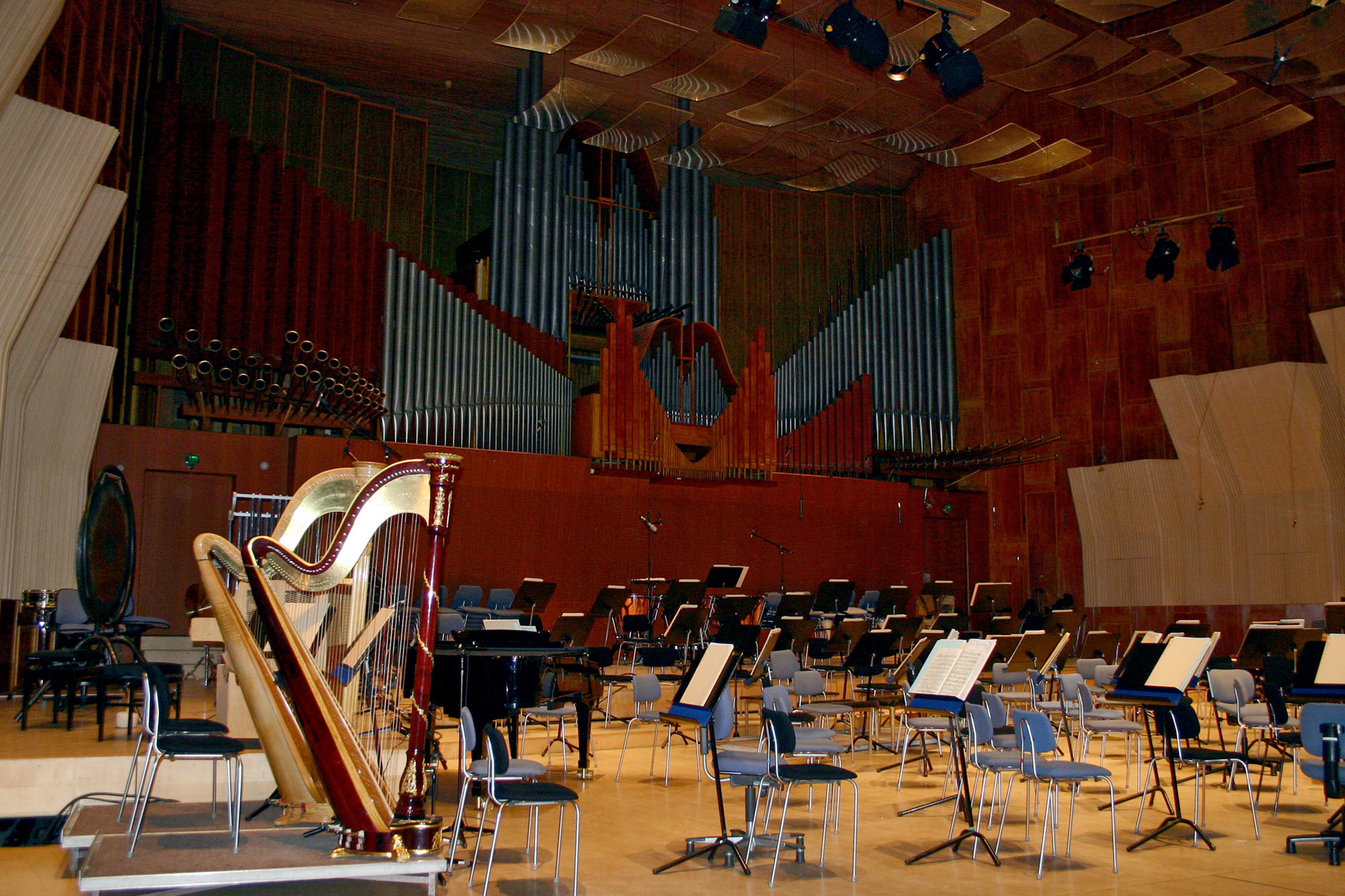 Radiohusets koncertsal har plads til 1074 publikummer fordelt på Gulv, Balkon og Etage. Koncertsalen blev første gang taget i brug den 11. september 1945. Studie 1: Radiohusets koncertsal har plads til 1074 publikummer fordel på Guld, Balkon og Etage. Koncertsalen blev første gang taget i brug den 11. september 1945. Plexiglaspladerne i loftet blev sat op i 1989 (nej, de er ældre, fra halvfjerdserne)som følge af, at musikerne ikke kunne 'fornemme' resten af orkestret. Bemærk i øvrigt, at orglets baspiber vender udblæsningshullet ud mod publikum i stedet for lodret. En lille æstetisk detalje. Det er ikke baspiber der ligger vandret, men spanske trompeter.